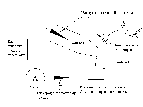 Схема patch-clamp в конфигурації whole-cell